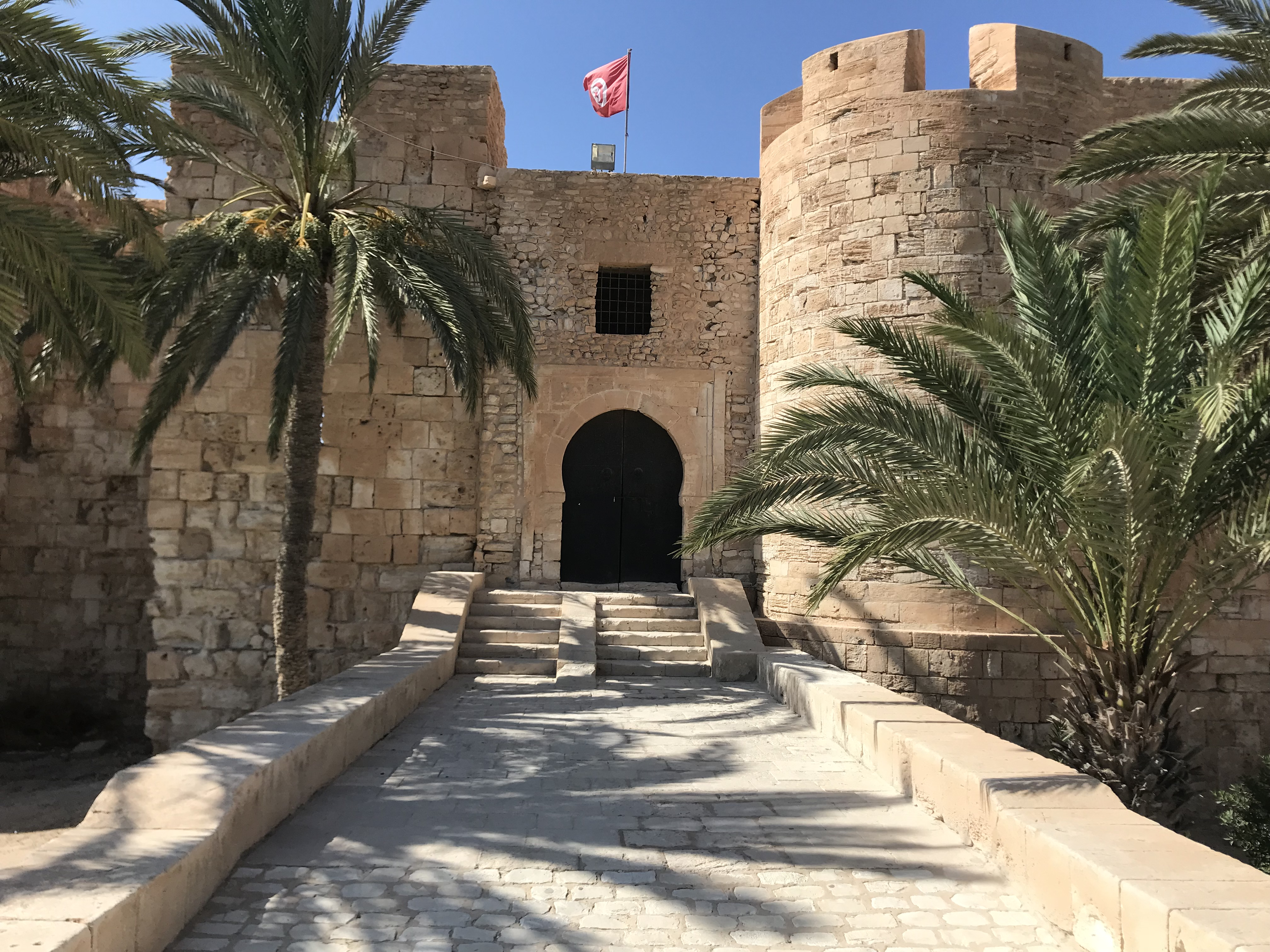 Borj Ghazi Mustapha, Djerba (Tunisie), 2018.